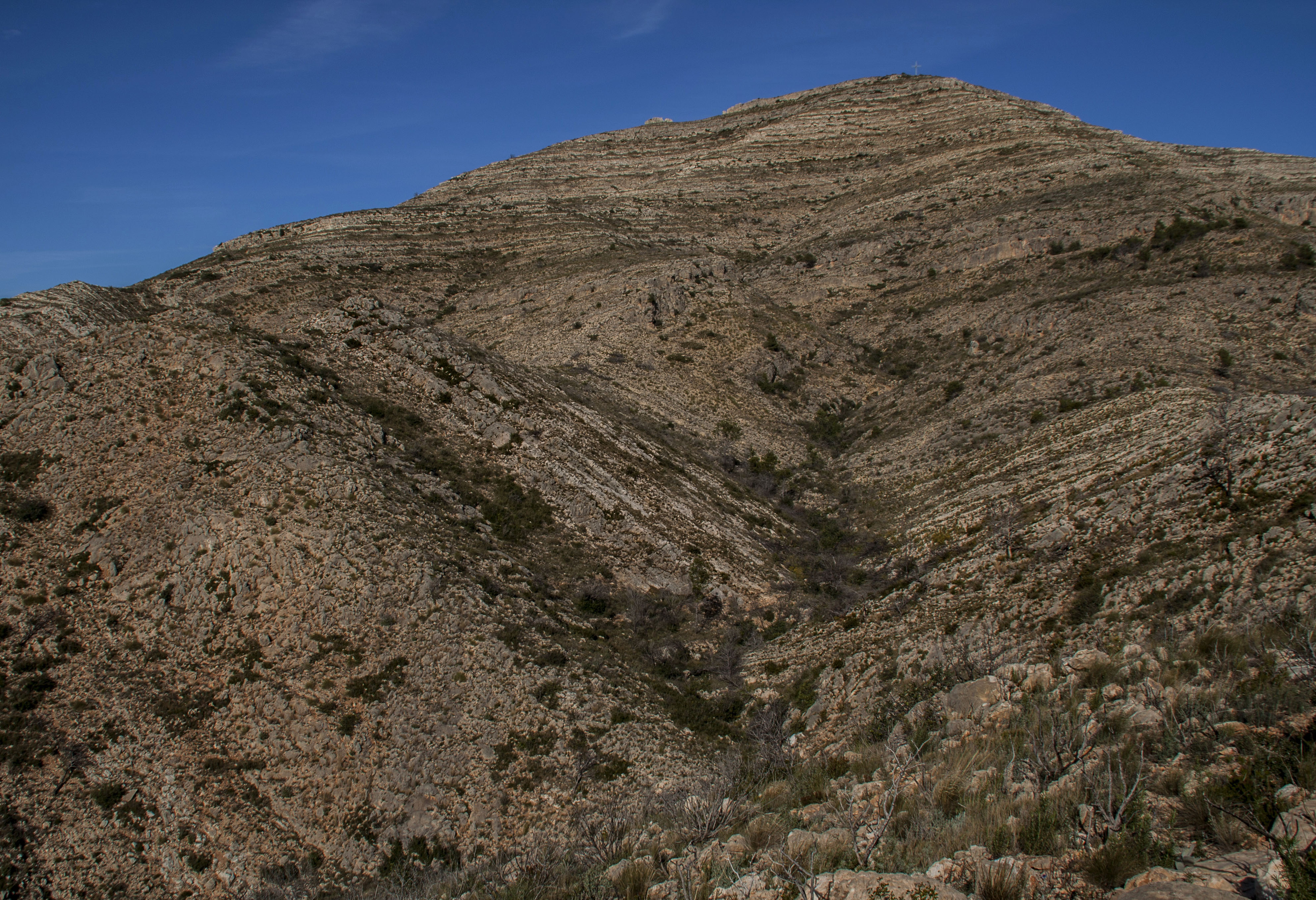 El Matamon és una muntanya de la Ribera Alta del País Valencià, situada al límit occidental del municipi de Carlet, a l'oest de la serra del Caballó, a nord-est del riu Xúquer i del Pantà de Tous, i al sud del riu Sec i Catadau, municipi del qual forma part, amb Carlet i Tous.